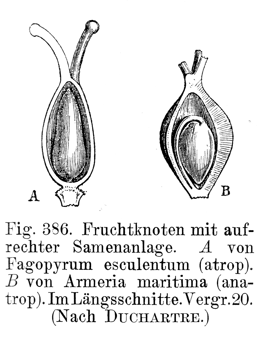 ovule / aufrechte Samenanlage